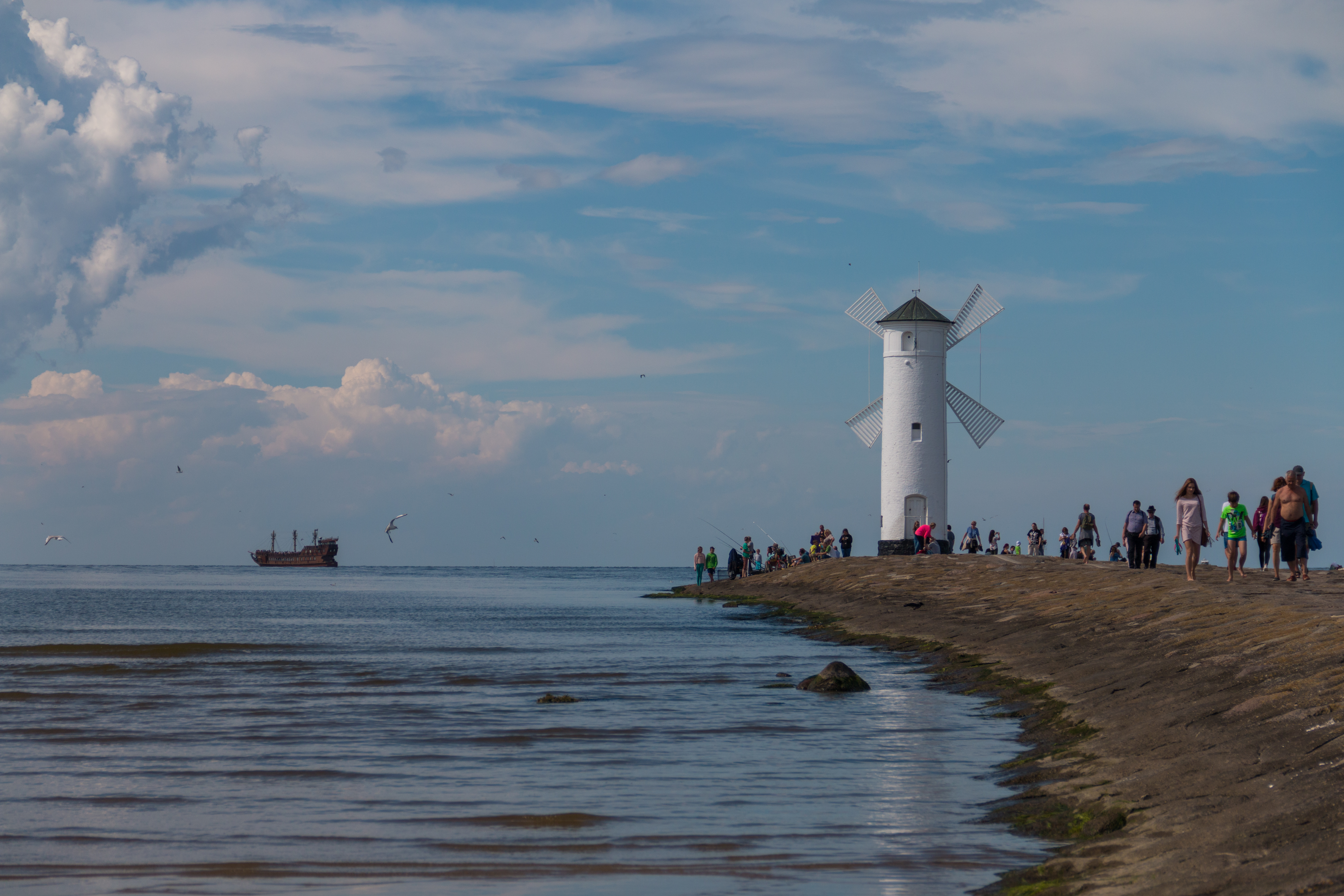 Stawa Młyny, Świnoujście